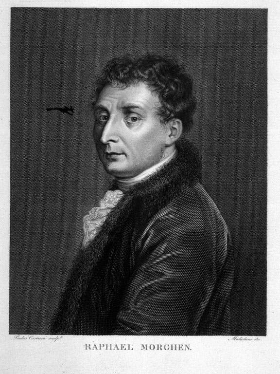 Portrait: Der italienische Kupferstecher und Graveur Raffaello Morghen (1758-1833)